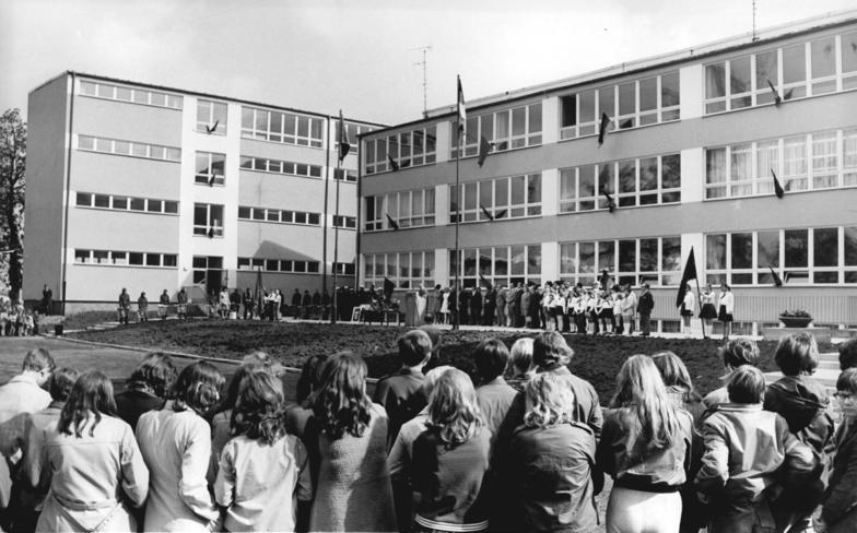 Erfurt, 39. Polytechnischen Oberschule, Apell ADN-ZB Demme 1.9.72 Erfurt: Erster Apell in der neuen Polytechnischen Oberschule 39 im Neubaugebiet an der Riethstraße im Norden der Stadt. 850 Schüler werden in dieser modernen Einrichtung von 53 Lehrern und Erziehern unterrichtet. Bis 1975 sollen im Bezirk nach weitere zehn neue Schulen übergeben werden.